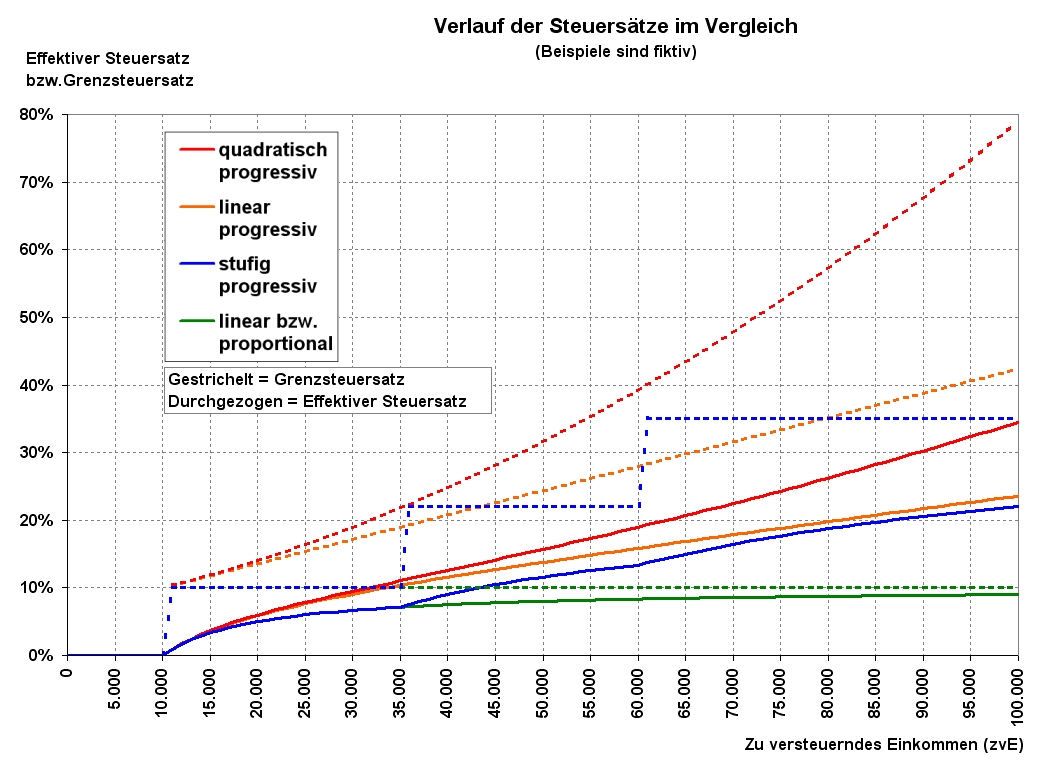 Vergleich der Verläufe der Steuersätze verschiedener Progressionsmodelle (Die Beispiele verdeutlichen nur das Prinzip und sind rein fiktiv)